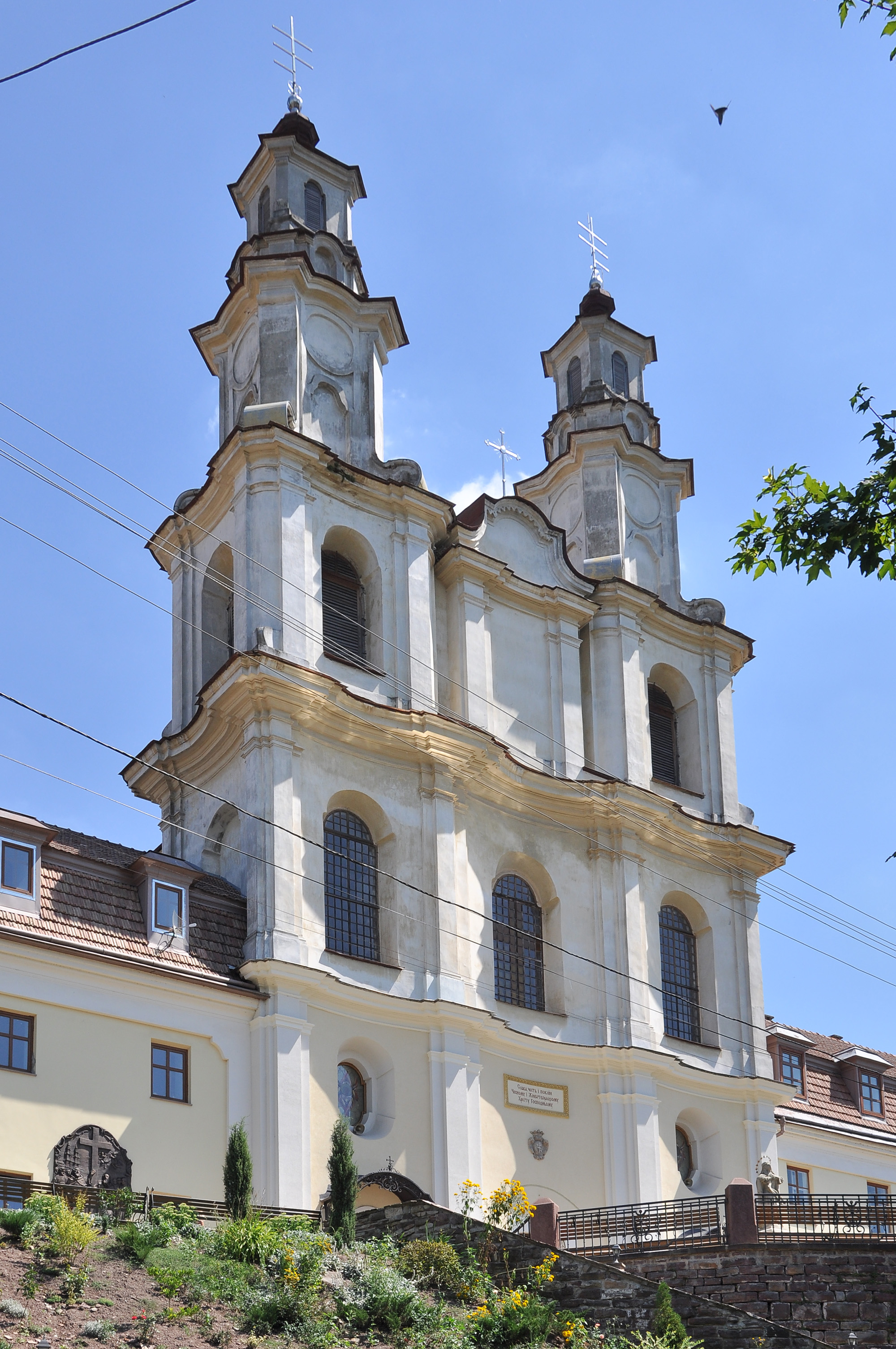 Здвиженська церква (мур.) Бучацького василіянського монастиря.